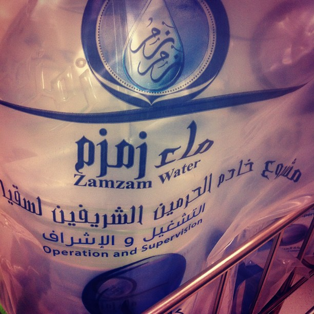 تغليف لعبوات معبأة من ماء زمزم ضمن مشروع خادم الحرمين الشريفين لسقيا زمزم